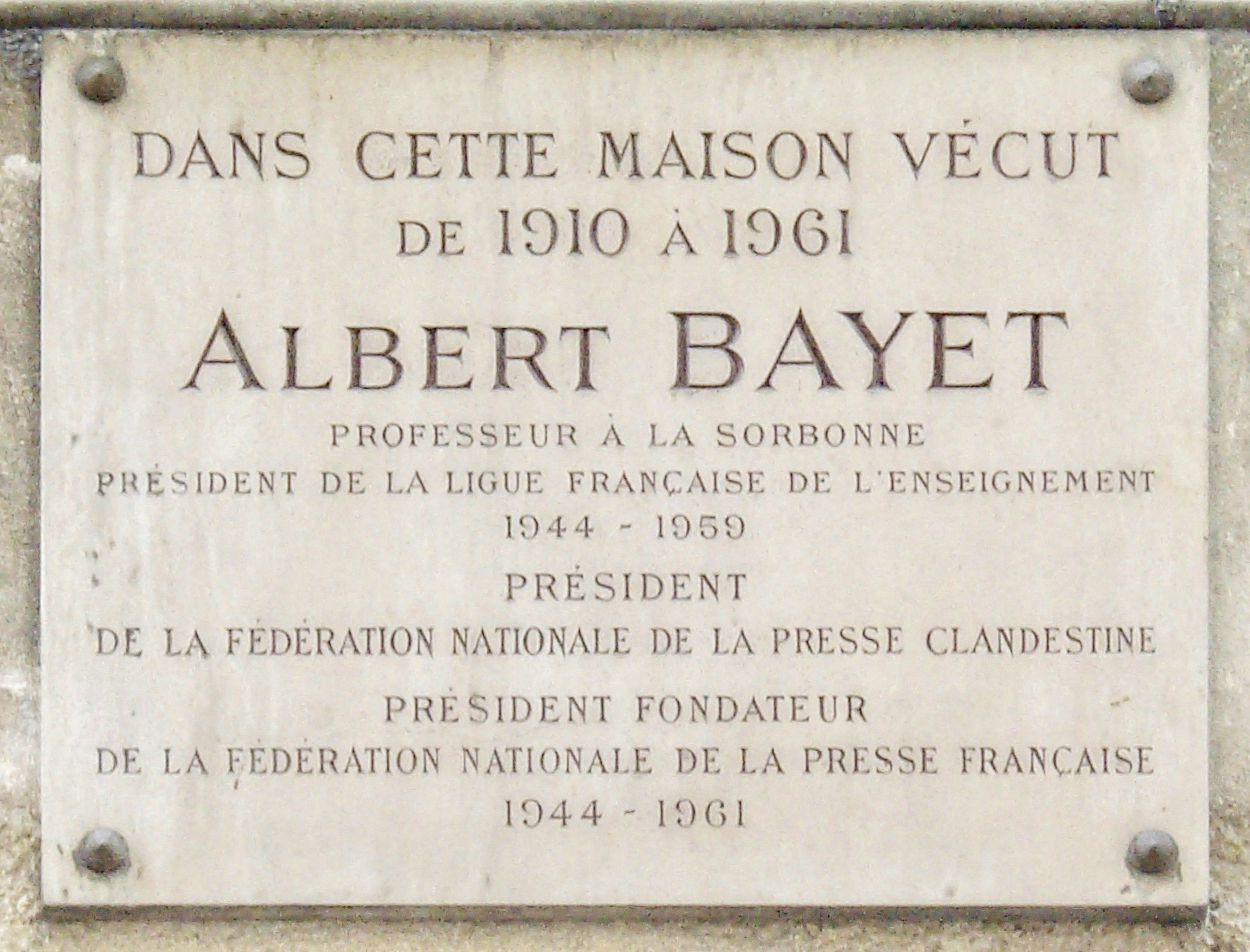 Plaque apposée au n° 2 de la rue Monsieur-le-Prince, Paris 6e, où vécut le sociologue Albert Bayet (1880-1961) de 1910 à 1961.